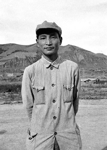 抗日战争时期，陈云在延安